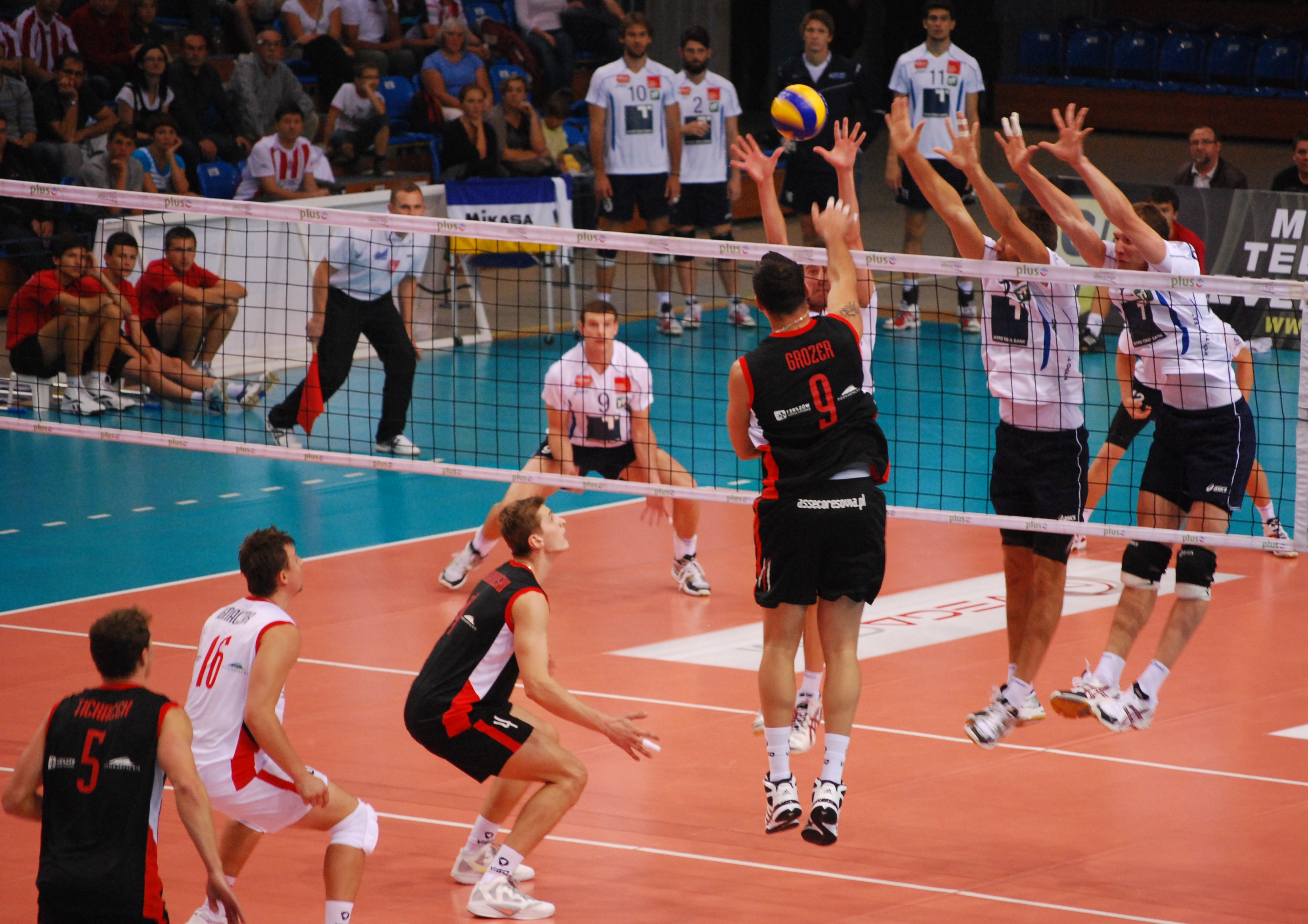 Georg Grozer w ataku